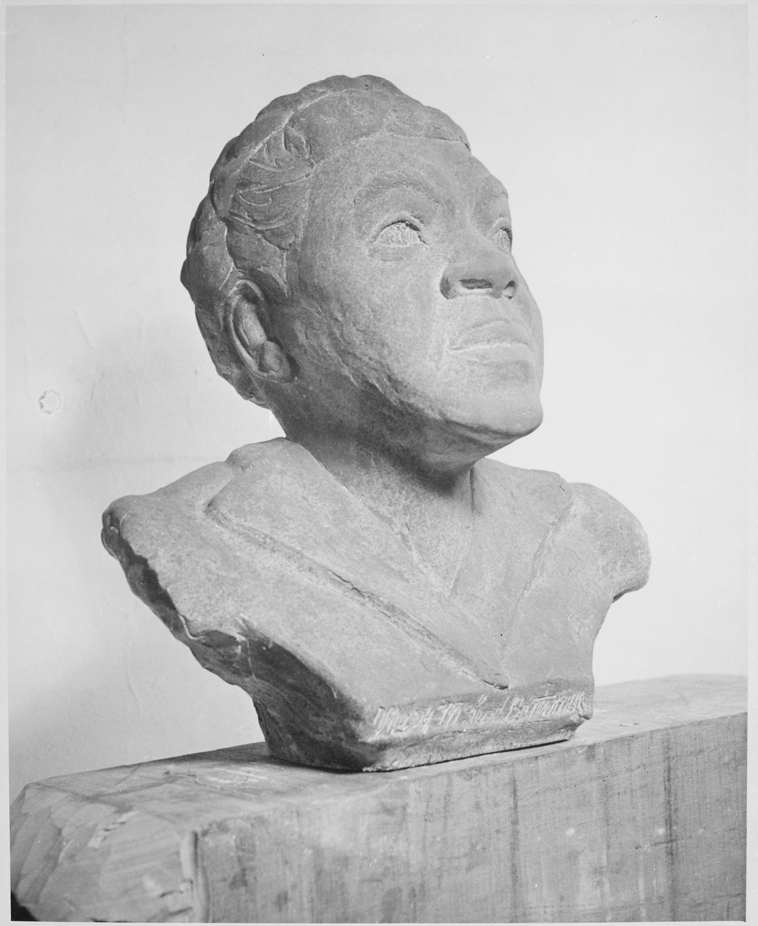 General notes: Sculpture.